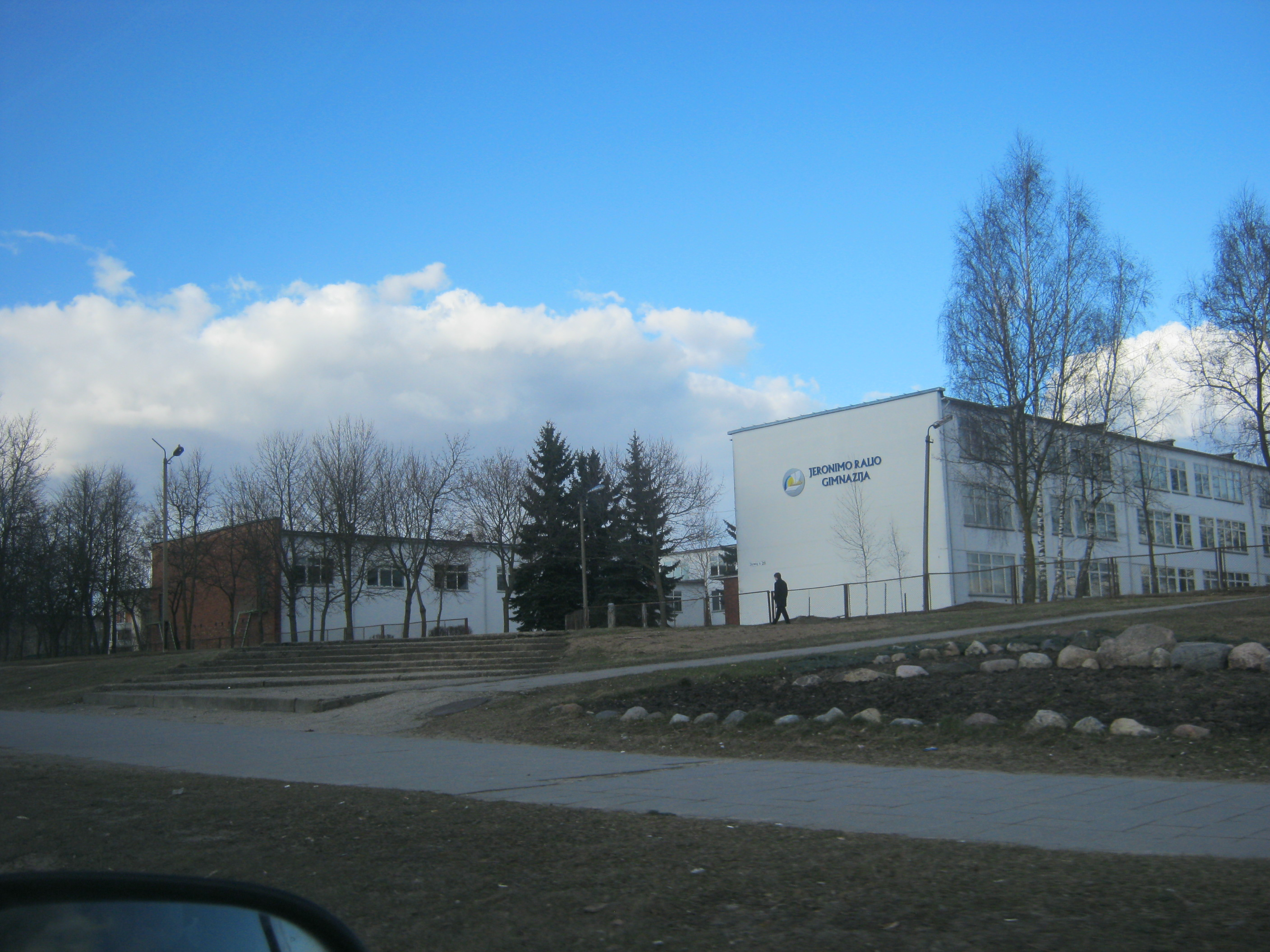 Jonavos Jeronimo Ralio gimnazija